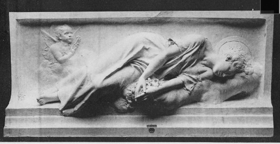 Emmanuel Hannaux bas relief : Sainte-Cécile présenté dans la revue l'Oeuvre d'art du 1er janvier 1899